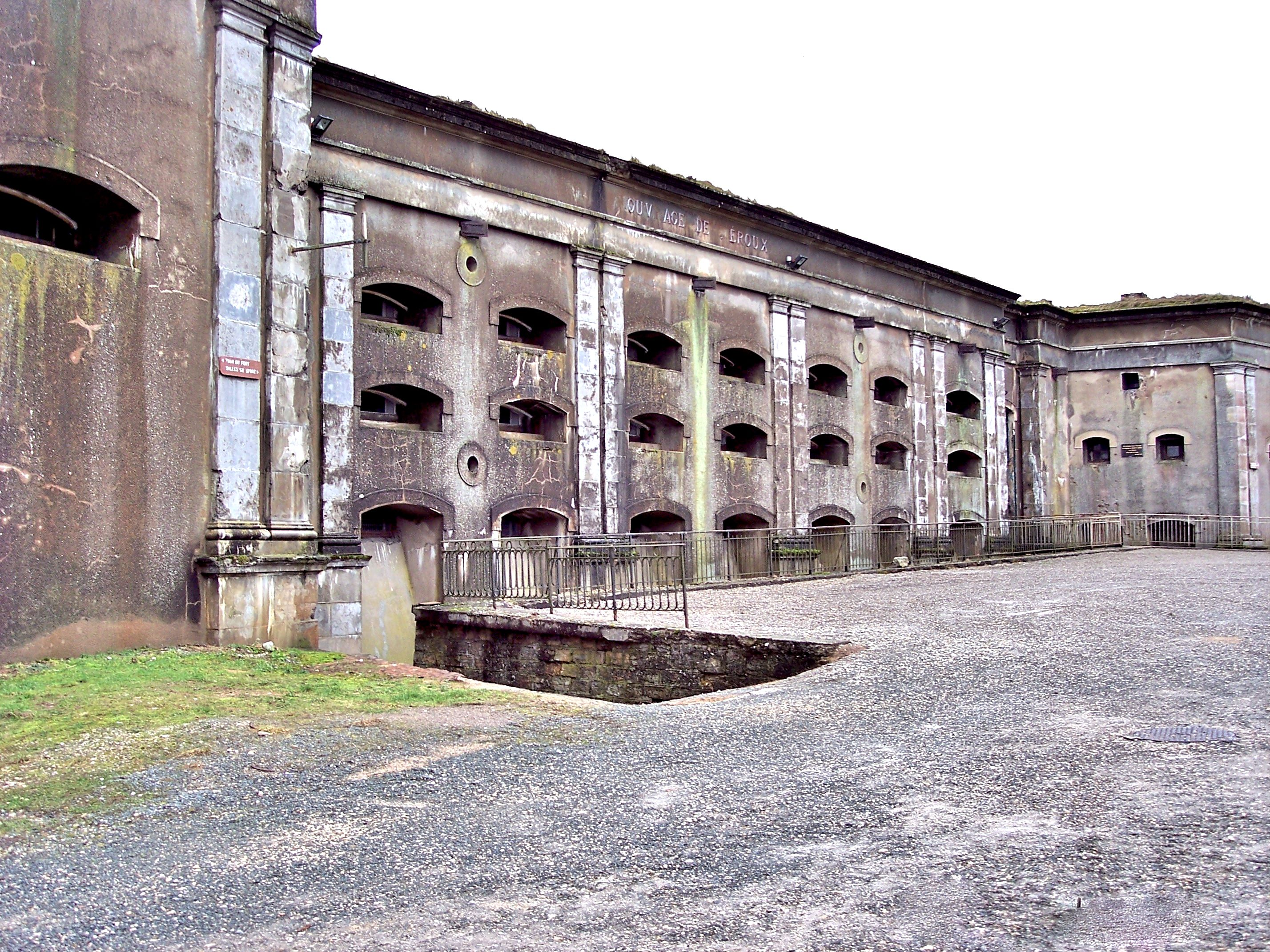 Façade du fort de Meroux